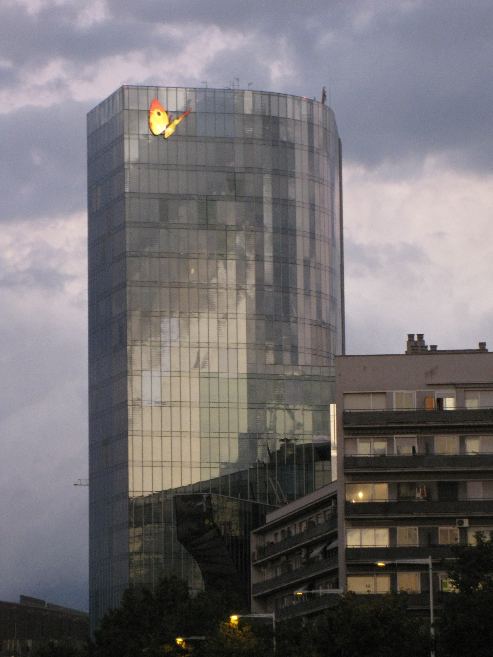 Torre Gas Natural, a la Barceloneta